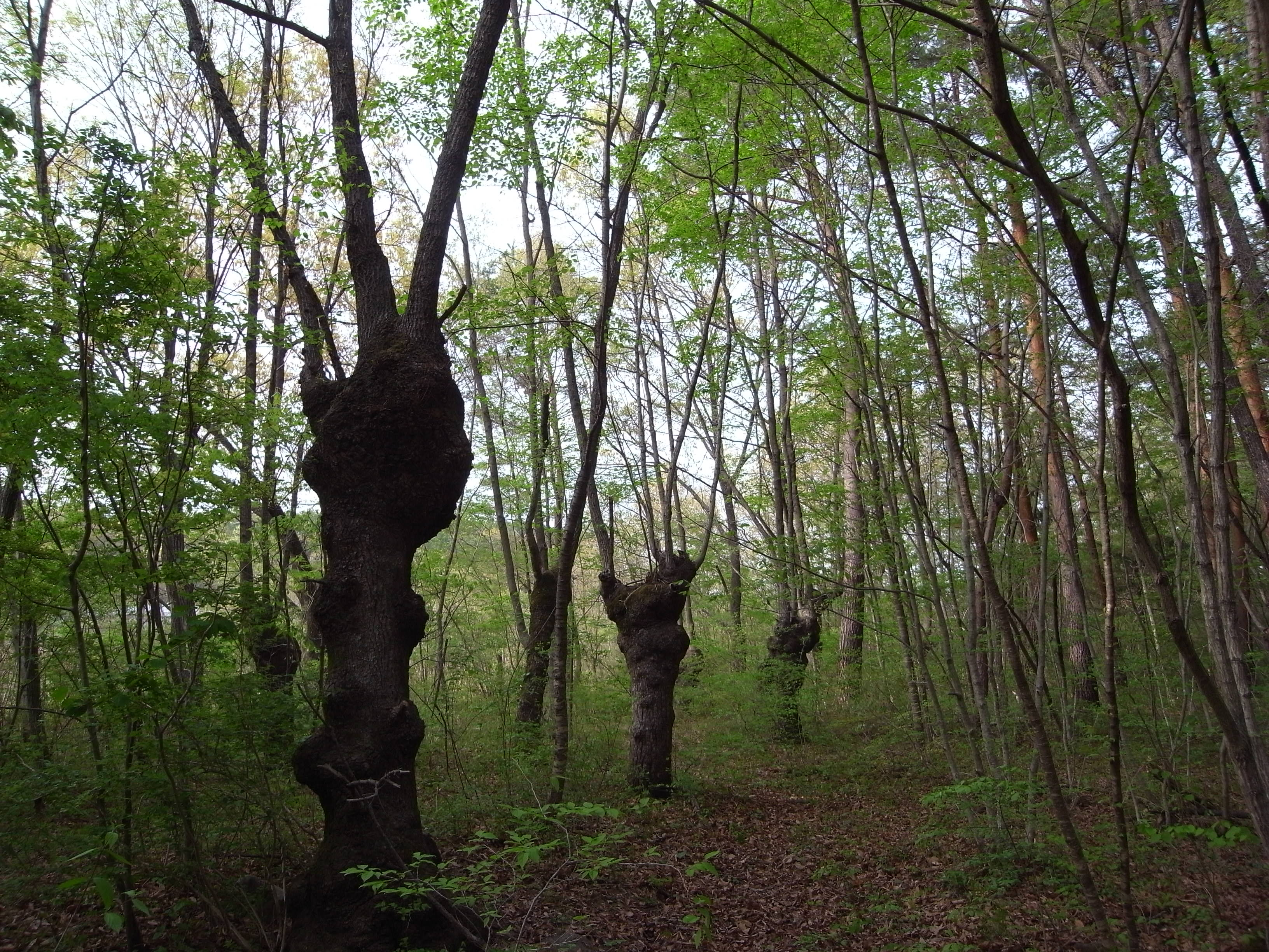 里山にみられる台場クヌギ